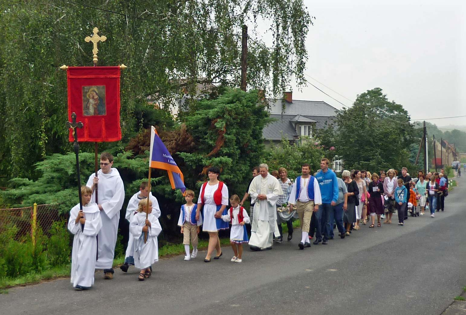 Liebeschitzer Wallfahrt Prozession in Klutschkau / Klucek